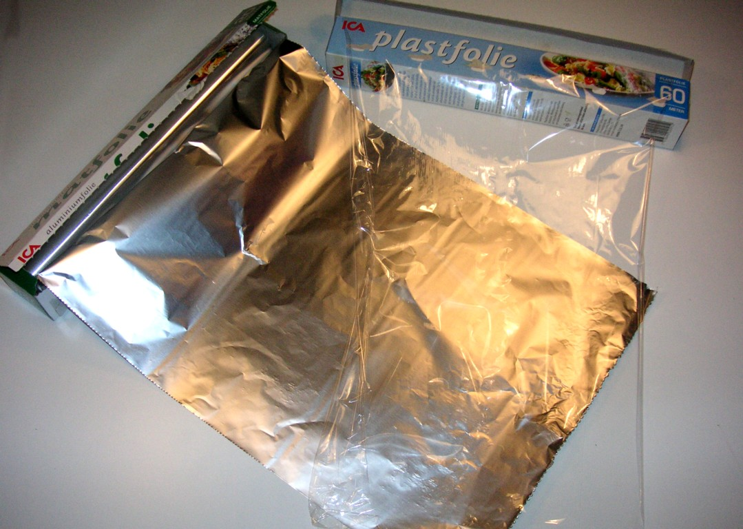 Plast- och aluminiumfolie